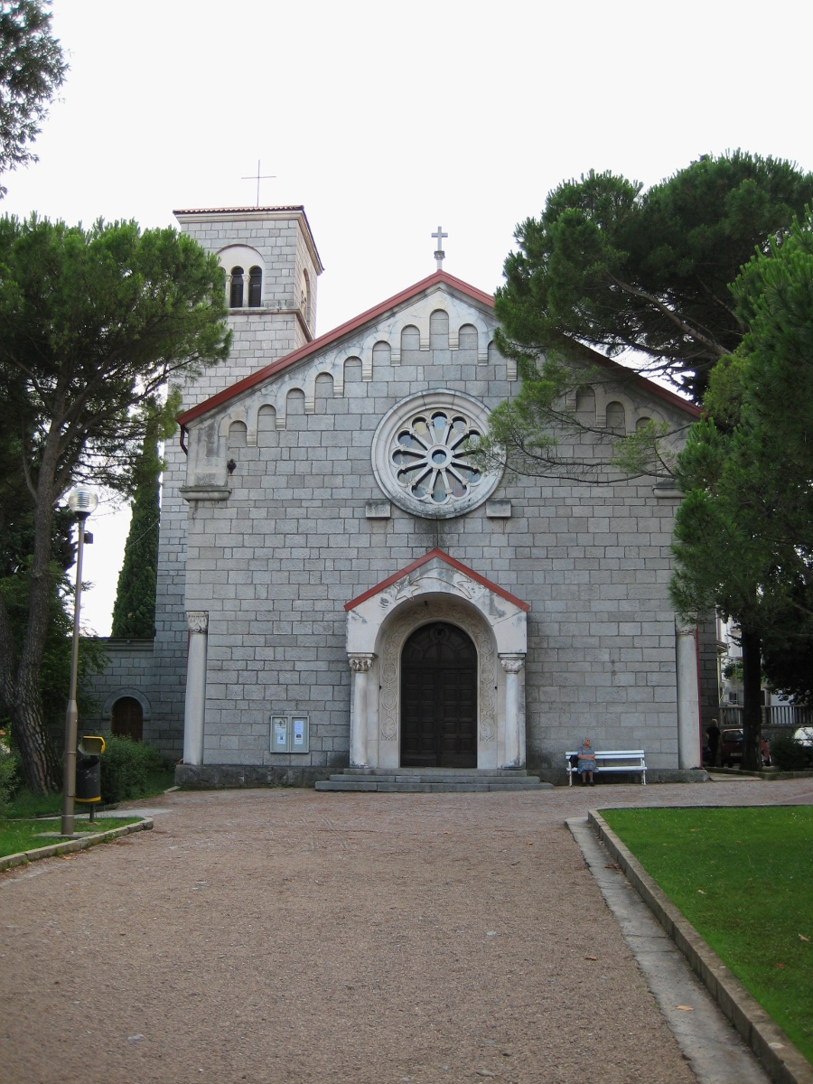 Crkva u Matuljima